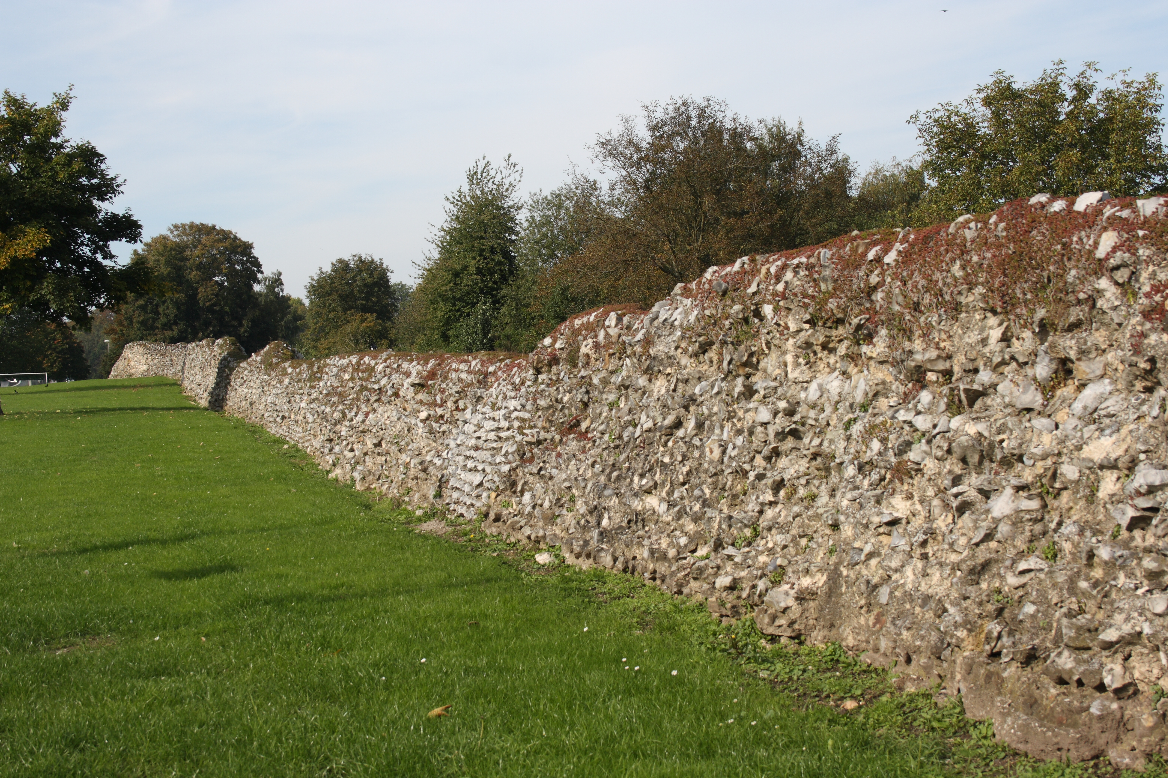 Römische Stadtmauer in Tongeren in Belgien